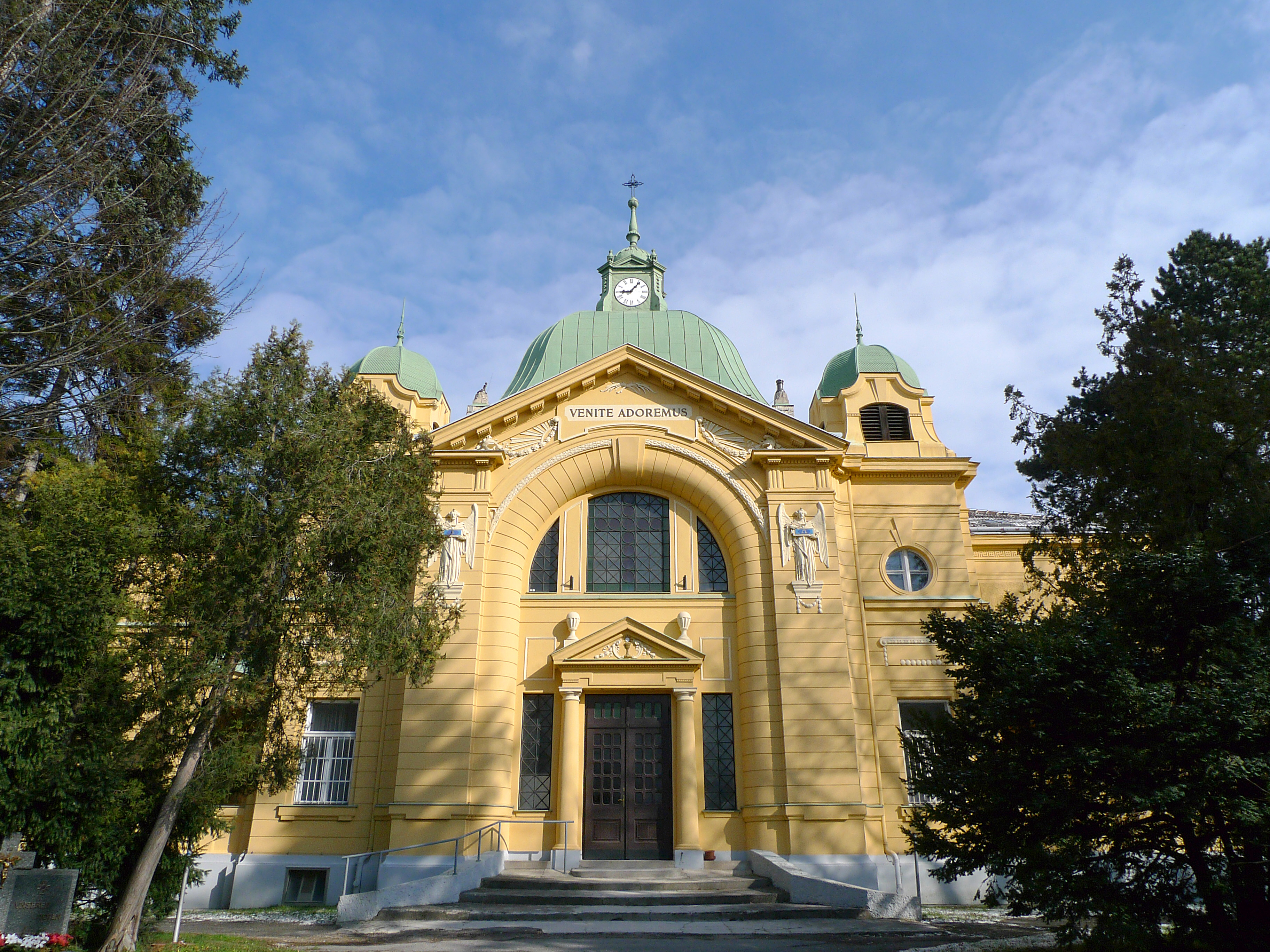 Invalidenhauskirche 2